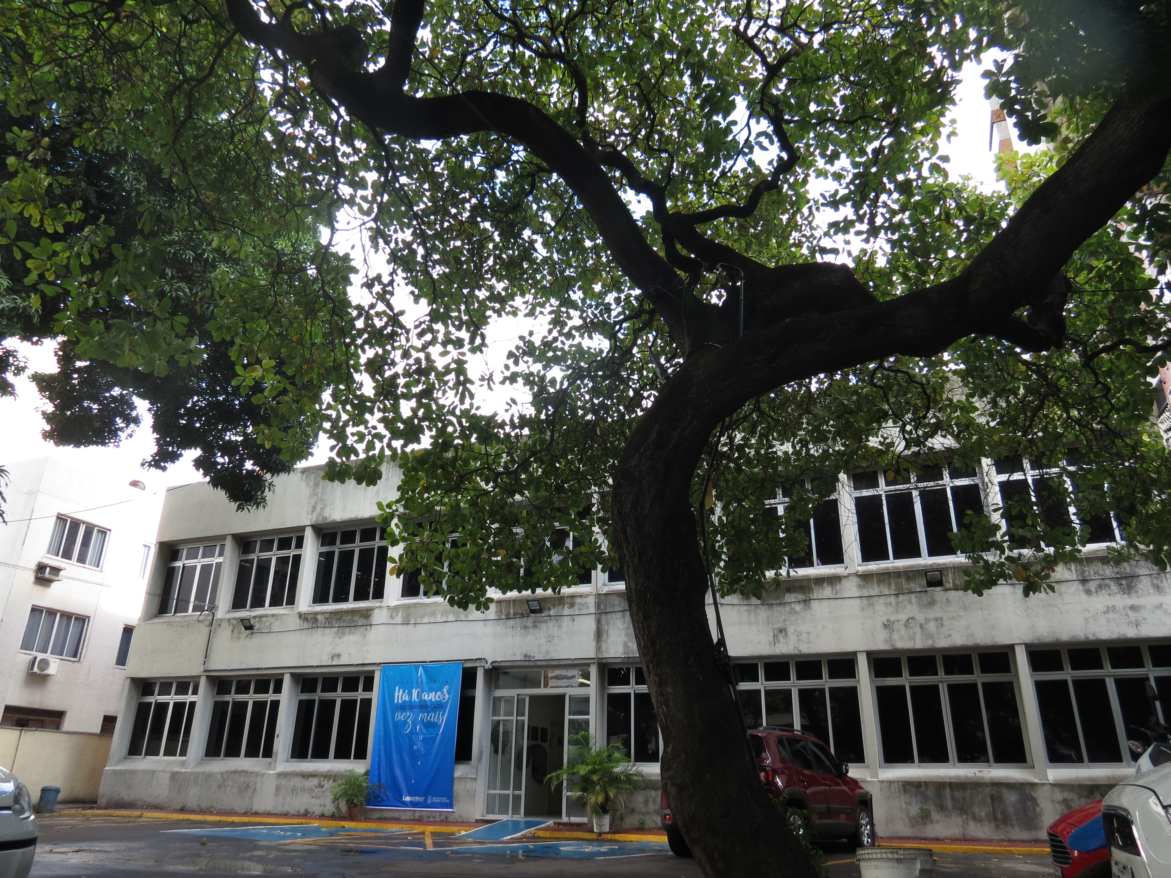 Fachada do Labomar, situado na Av. da Abolição, 3207, Fortaleza (Ceará), Brasil.